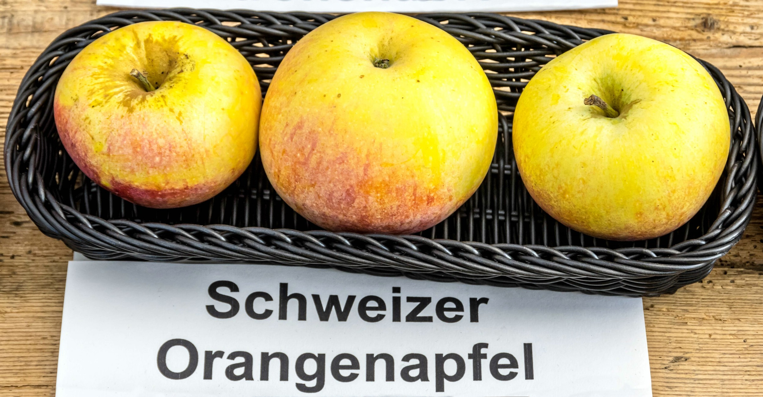 Alte Apfelsorten, von denen es im Badischen noch tragende Bäume gibt. Alle Aufnahmen au dem Oktober 2015